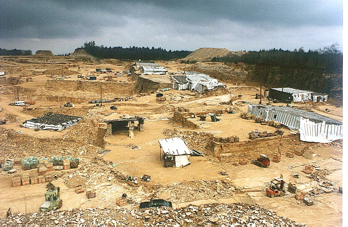 Plattenkalk-Bruch bei Solnhofen, Fossillagerstätte